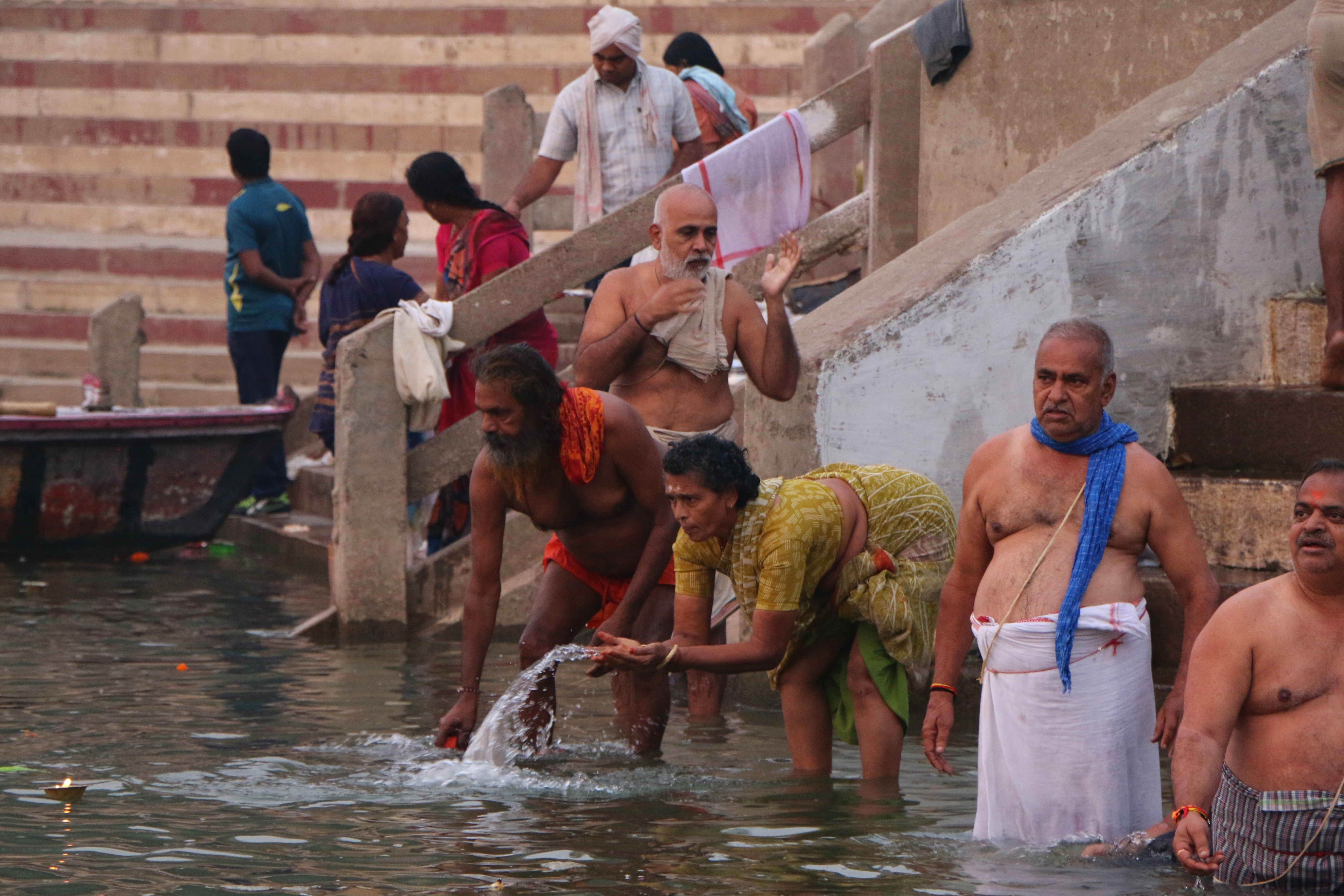 Kedar Ghat